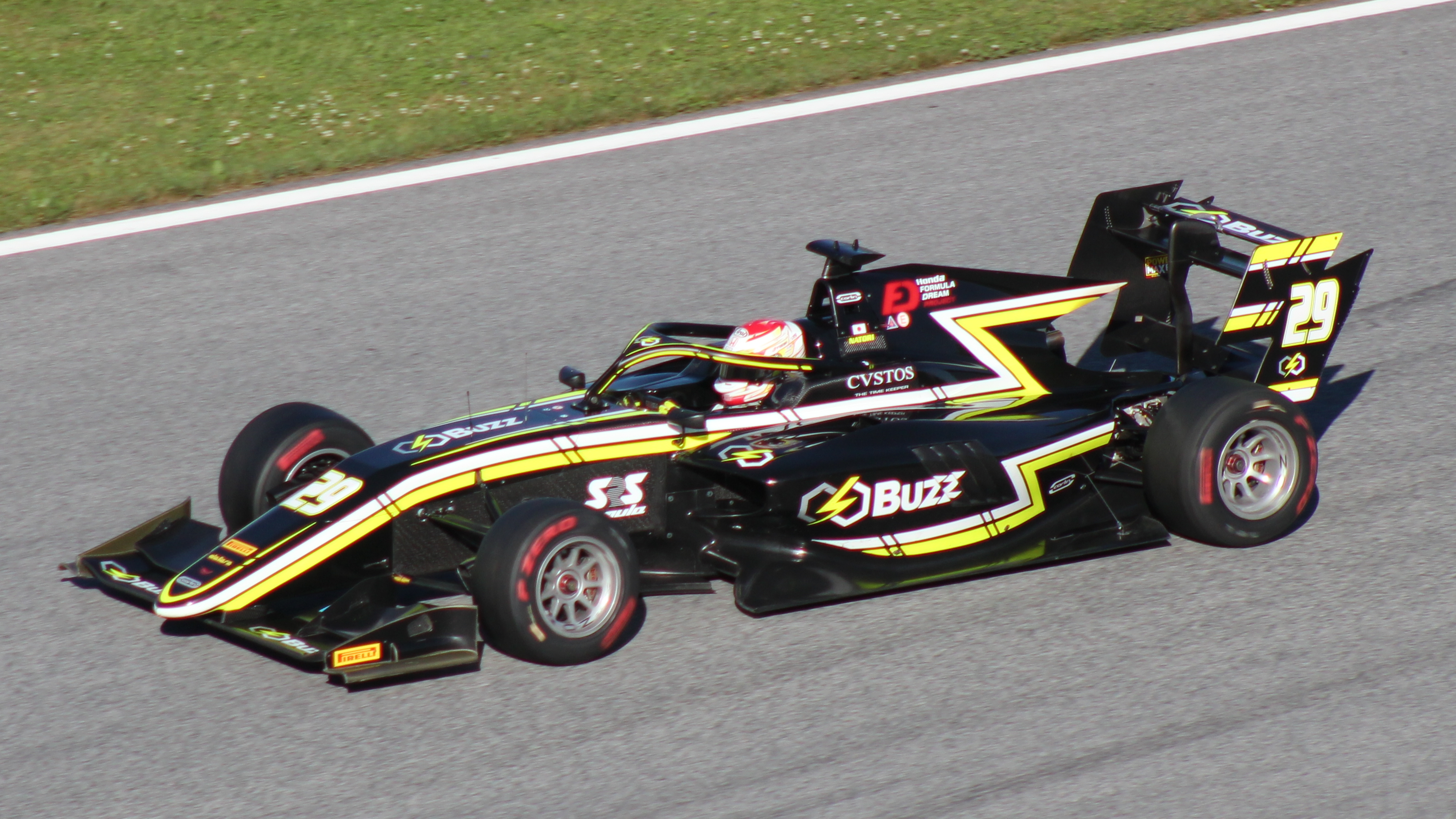 Natori beim Rennwochenende in Österreich 2019